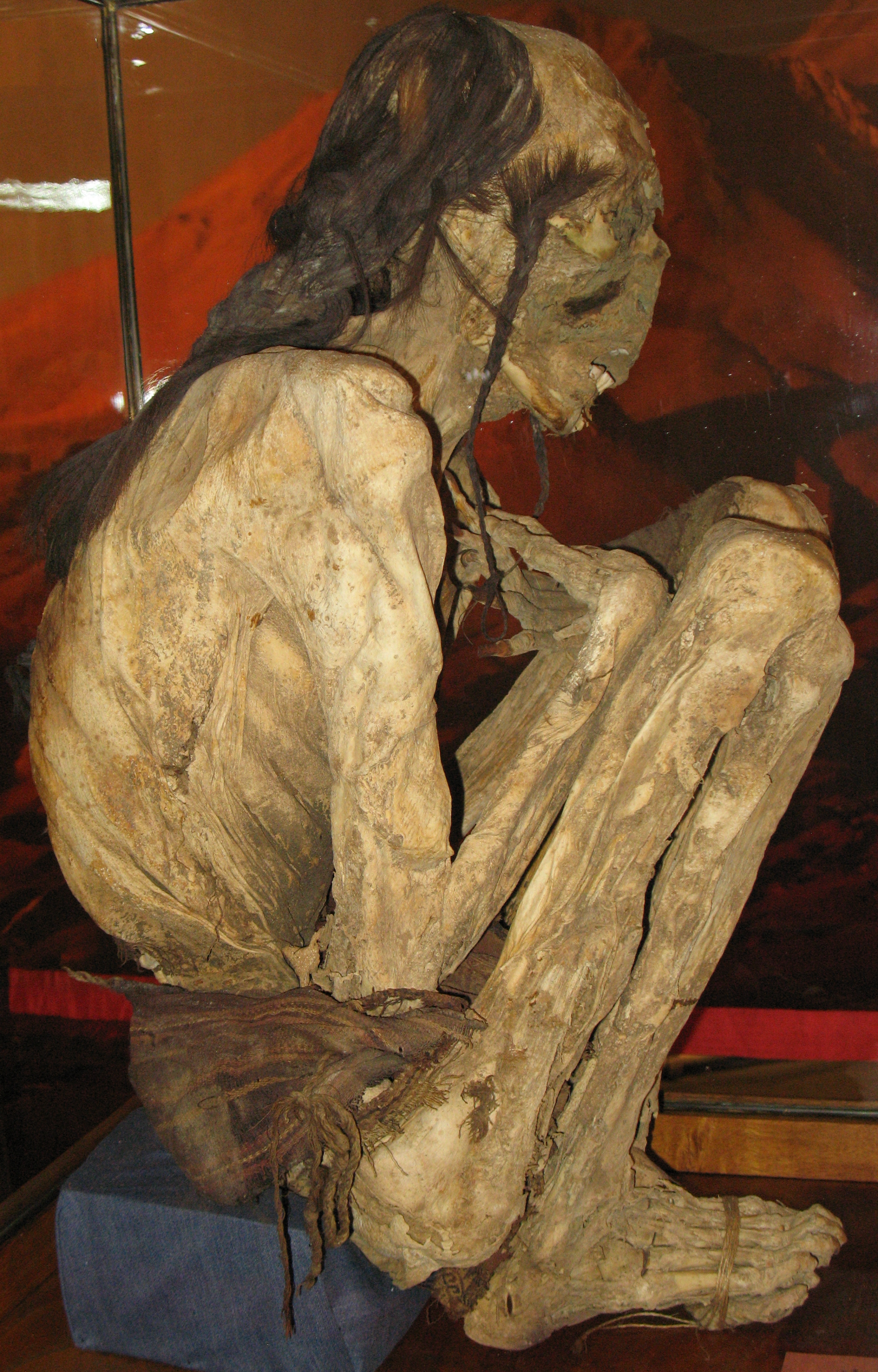 Weibliche Mumie in hockender Stellung mit Grabbeigaben. Die Mumie stammt aus dem zentralen Hochland der Atacama (Südperu, Chile) Medizinhistorisches Museum der Philipps-Universität Marburg a.d. Lahn; 2011/12 Teil der Sonderausstellung „Schätze der Anden – Chiles Kupfer für die Welt“ des Deutschen Bergbaumuseums Bochum